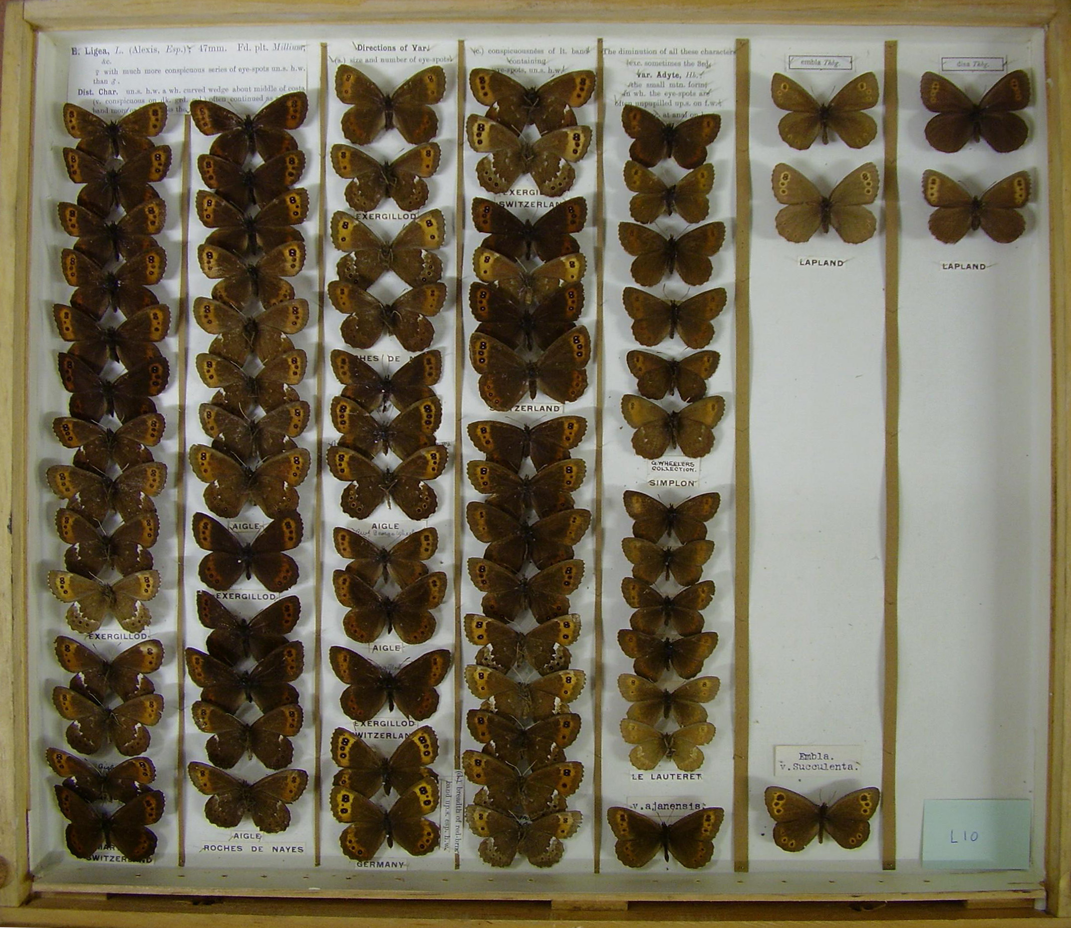 Museum drawer of Erebia ligea